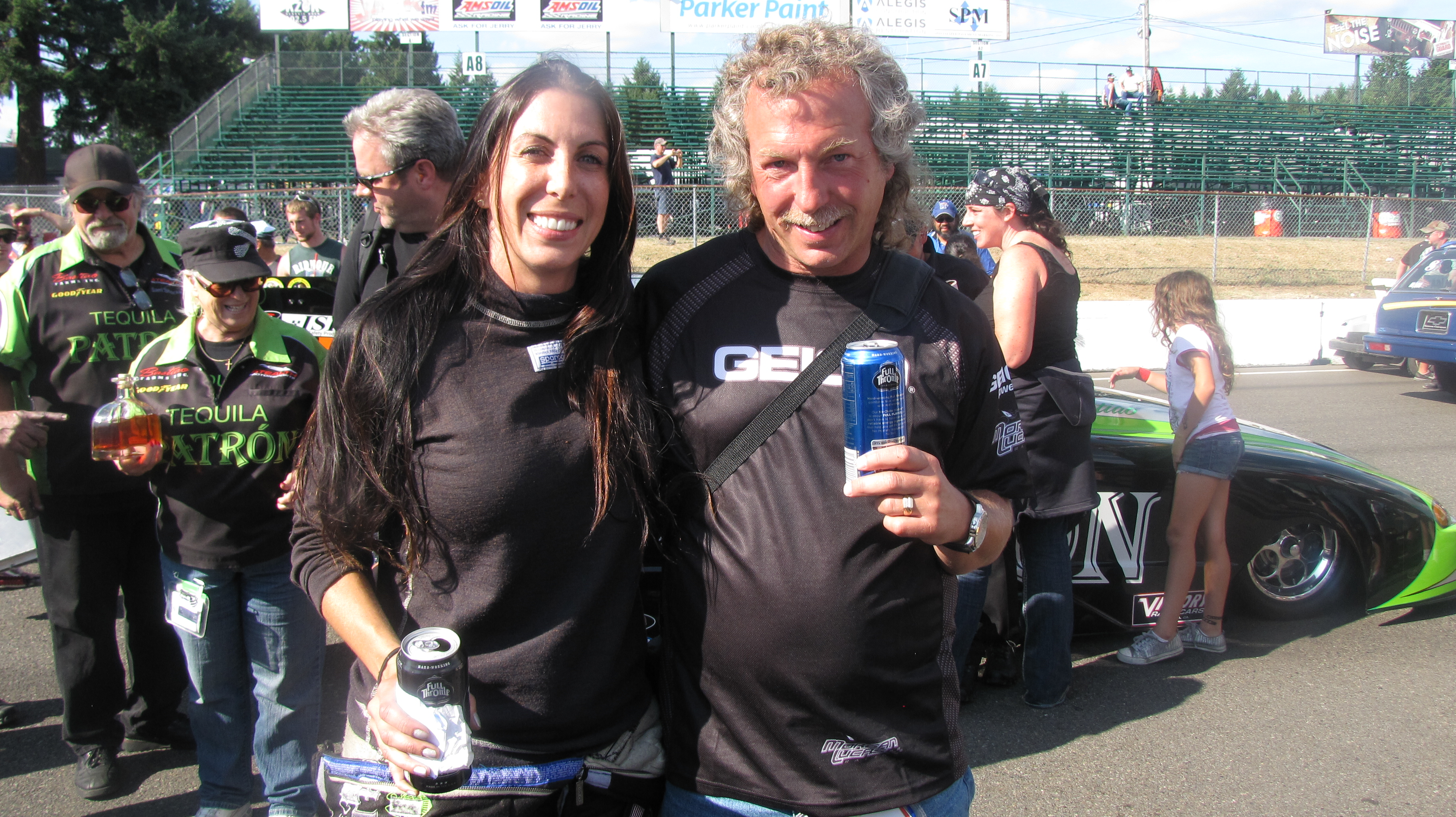 2011-Aug7-Finals (93)